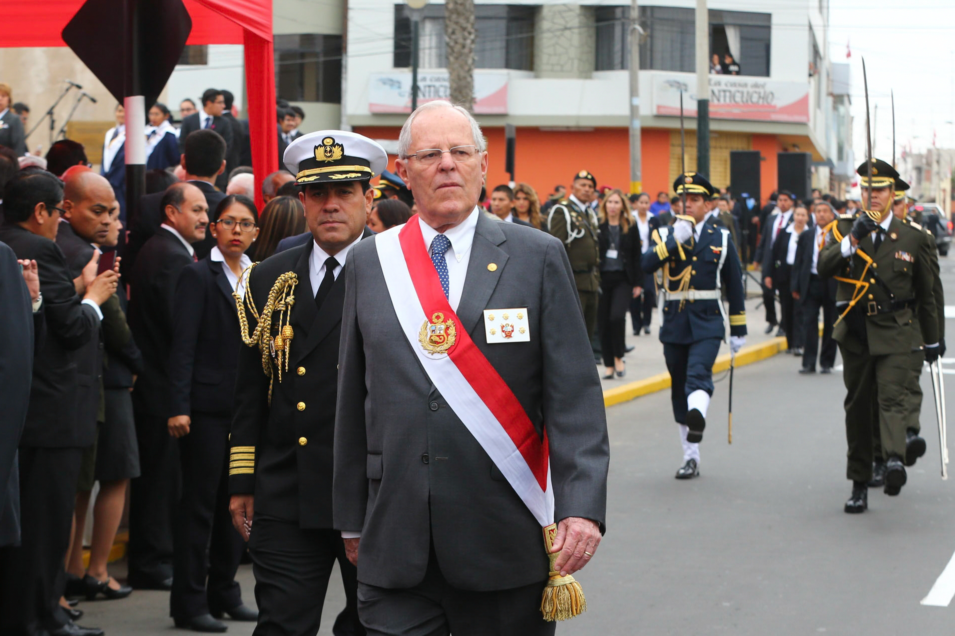 Pedro Pablo Kuczynski durante procesión de la bandera en Tacna (2017)